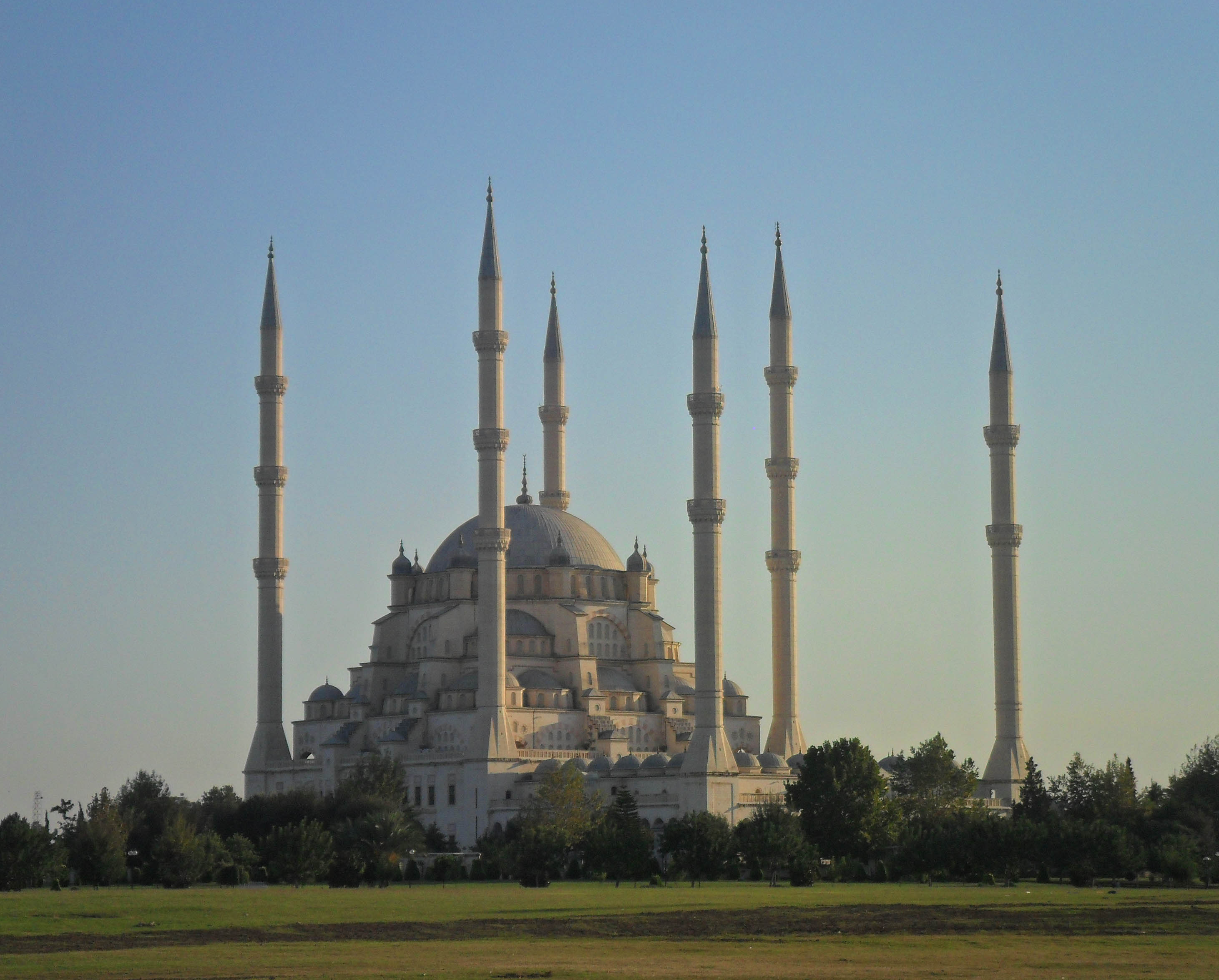 Sabancı Cami'nin Merkez Park'tan çekilmiş bir fotoğrafı.